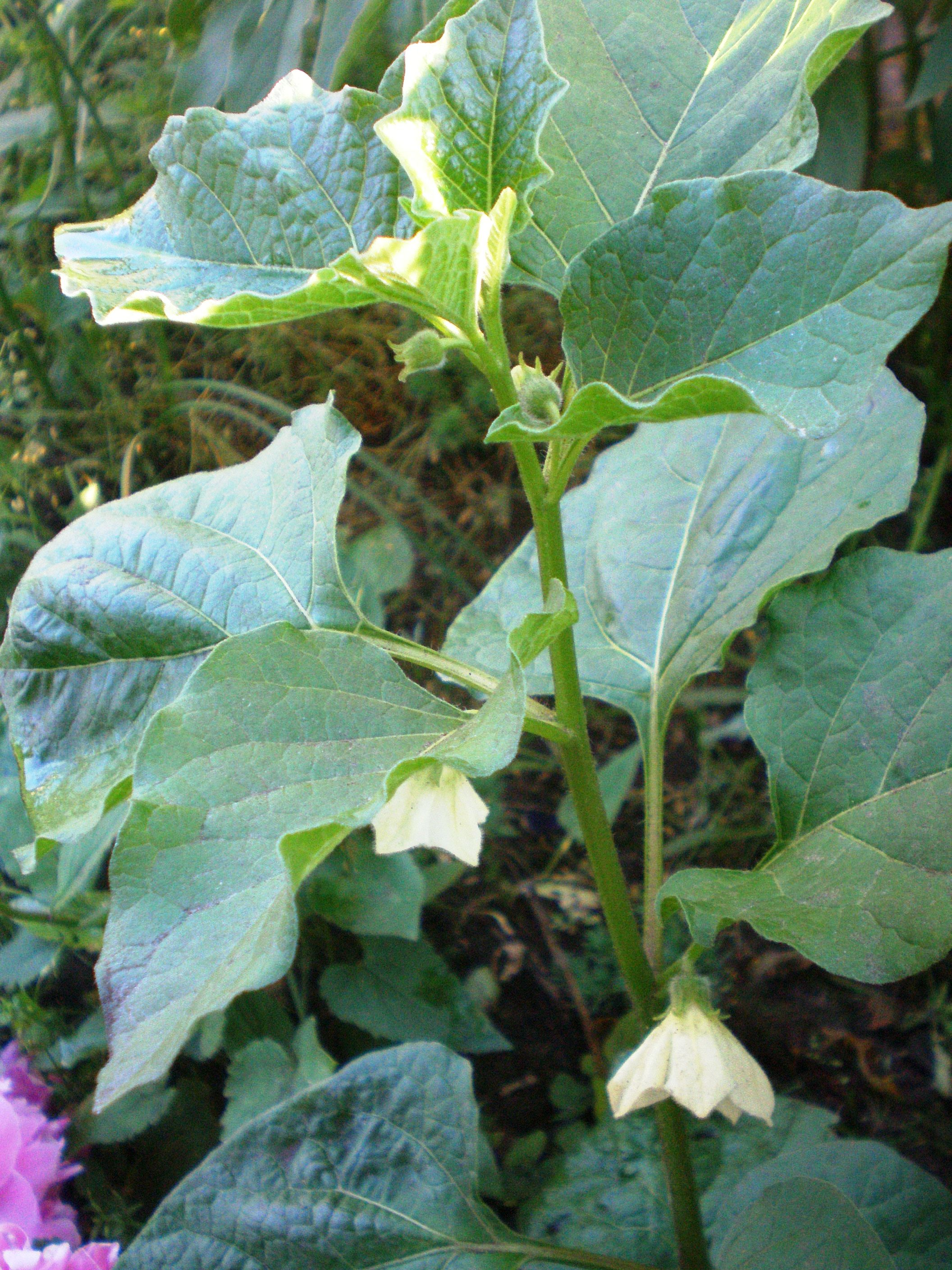 Physalis alkekengi